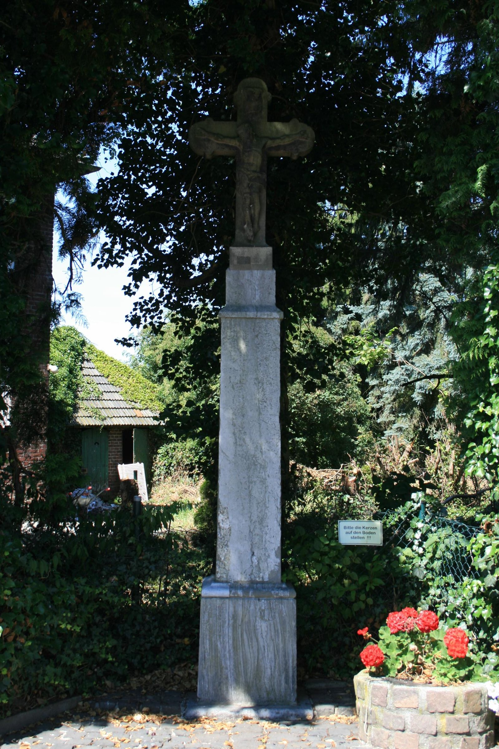 Wegekreuz Görresstraße-Hardter Straße Mönchengladbach